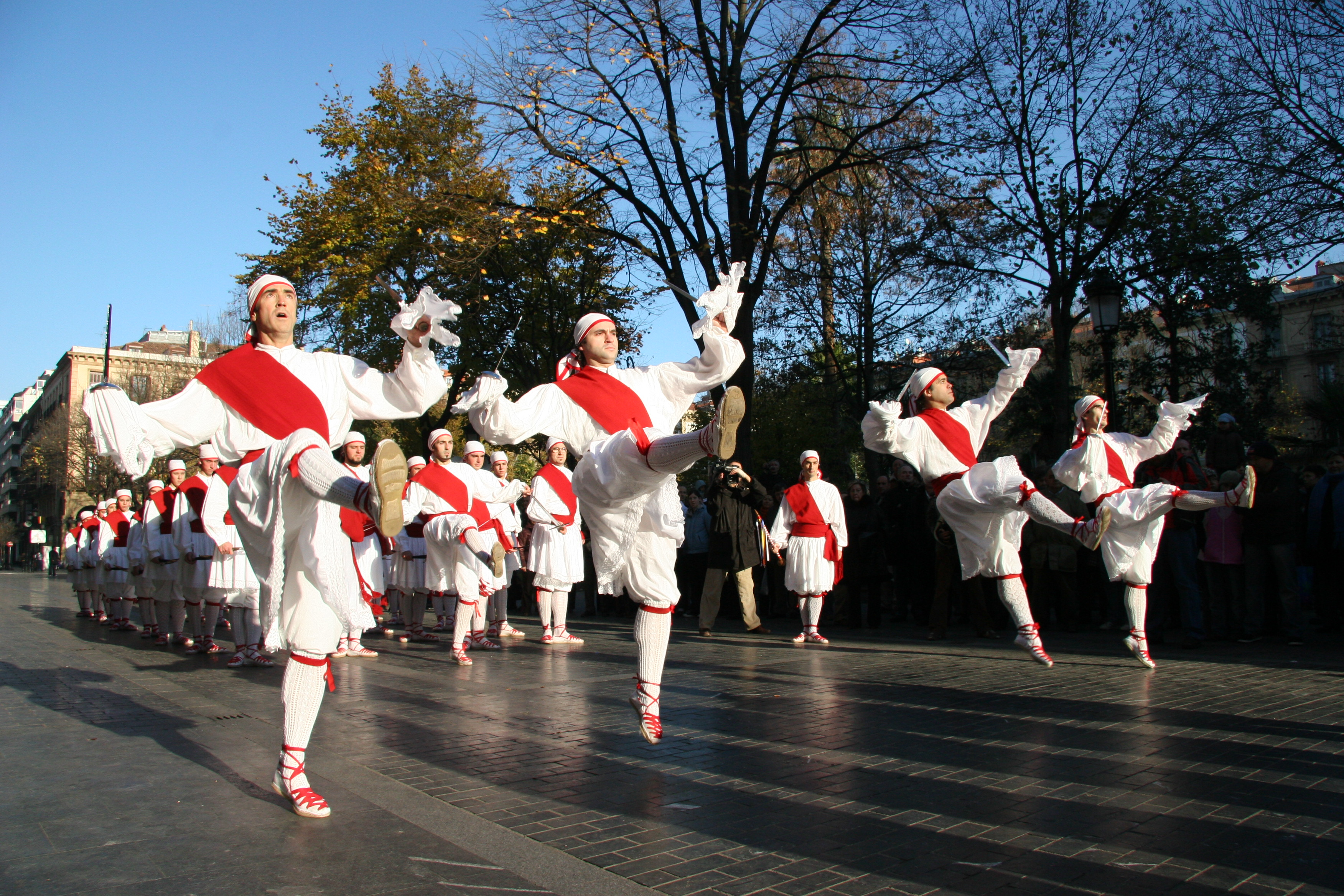 Basque Dancers